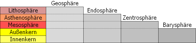 Eine Übersicht der Geosphäre in ihrer Begriffsbedeutung nach Stephen Pearl Andrews (1871).[1][2][3] Die Geosphäre umfasst hier alle Erdsphären ab der Lithosphäre und tiefer: Lithosphäre [4] Asthenosphäre [5] (geosphärische) Mesosphäre [6][7] Außenkern (Äußerer Erdkern) [8] Innenkern (Innerer Erdkern) [9] Innerhalb der Geosphäre die (geosphärische) Endosphäre: [10][11] Asthenosphäre (geosphärische) Mesosphäre Außenkern (Äußerer Erdkern) Innenkern (Innerer Erdkern) Innerhalb der (geosphärischen) Endosphäre die Zentrosphäre: [12][13] (geosphärische) Mesophäre Außenkern (Äußerer Erdkern) Innenkern (Innerer Erdkern) Innerhalb der Zentrosphäre die Barysphäre: [14][15] Außenkern (Äußerer Erdkern) Innenkern (Innerer Erdkern) Andrews SP: The Primary Synopsis of Universology and Alwato. New York, 1871: 105 Miller JT Jr., Spoolman SE: Essential of Ecology. Belmont, 2011: 56 Manahan SE: Water Chemistry. Boca Raton, 2011: 4 Suess E: Die Entstehung der Alpen. Wien, 1875: 158-159 Barrell J: The strength of the Earth's crust. I. Part IV. In: The Journal of Geology 22 (1914): 296 Daly RA: Strength and structure of the earth. New York, 1940: 13 Huggett RJ: Fundamentals of Geomorphology. New York, 2011: 93 Gutenberg B: Über die Konstitution des Erdinnern, erschlossen aus Erdbebenbeobachtungen. In: Physikalische Zeitschrift 14 (1913): 1217-1218 Lehmann I: P' . In: Publications du Bureau Central Séismologique International A14 (1936): 87-115 v Braun W: Saturn rocket systems and space exploration. Huntsville, 1965: 93 Lisitzin AP: Sea-Ice and Iceberg Sedimentation in the Ocean. New York, 2002: 16 Dryer CR: Lessons in physical geography. New York 1901: 27 Barrell J: The strength of the Earth's crust. I. Part IV. In: The Journal of Geology 22 (1914): 296 Qazi SA: Principles of Physical Geography. New Delhi, 2004: 81 Kabata-Pendias A, Mukherjee AB: Trace Elements from Soil to Human. Berlin·Heidelberg, 2007: 237